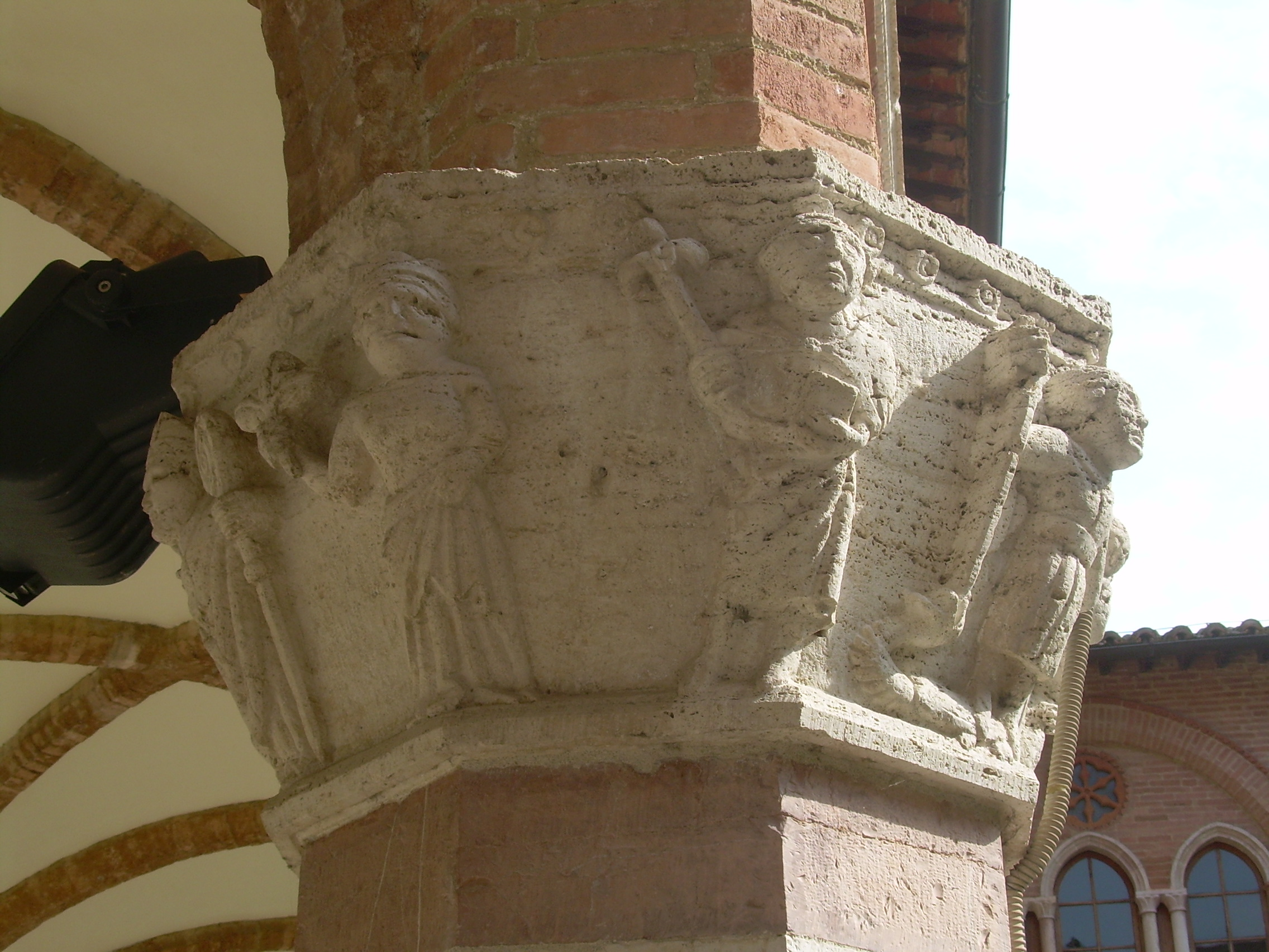 Capitello del chiostro dell'ex monastero di S. Giuliana, oggi Scuola di Lingue estere Esercito Italiano